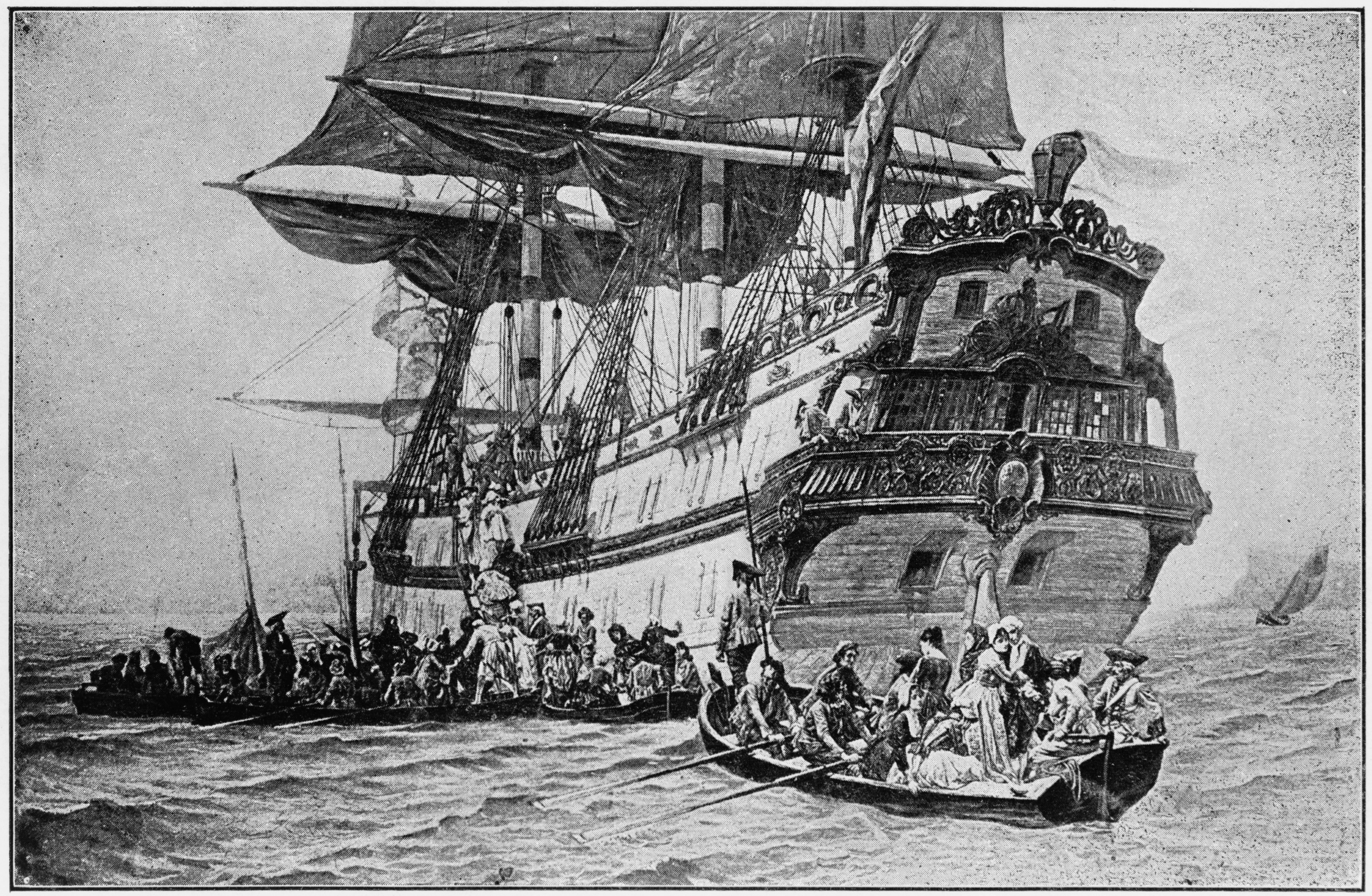 Copie en noir et blanc d'un tableau de Charles Édouard Delort peint en 1875 pour illustrer le roman L’Histoire du chevalier Des Grieux et de Manon Lescaut paru en 1731.